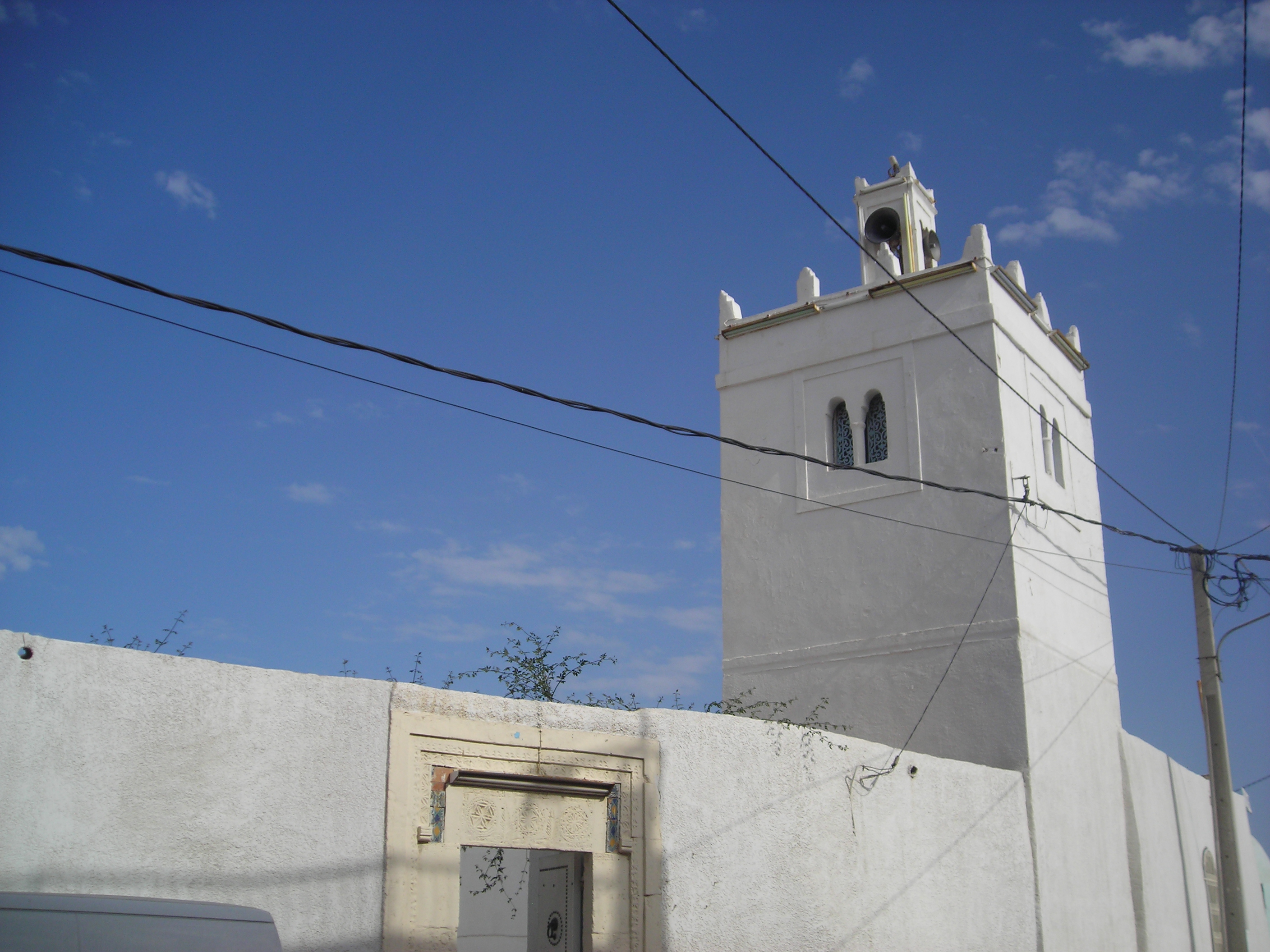 Mosquée de Sidi Abou Abana construite en 1253 sur ordre du sultan hafside Abû `Abd Allah Muhammad al-Mustansir